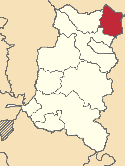 Mapa localizacor del cantón en Chimborazo, Ecuador